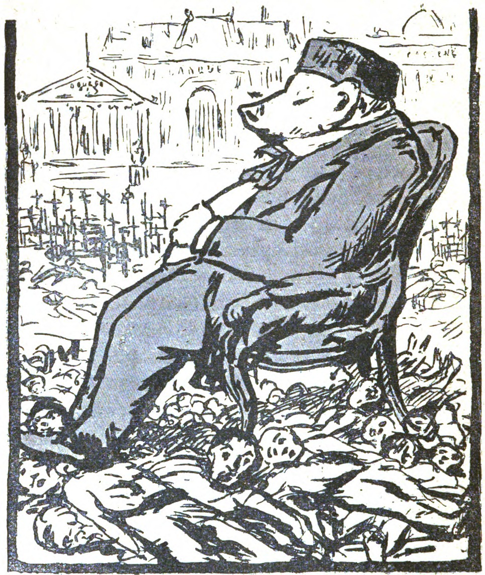 La Bourgeoisie